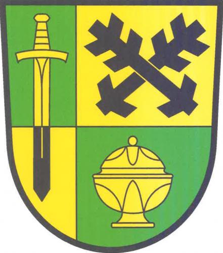 Mařenice znak